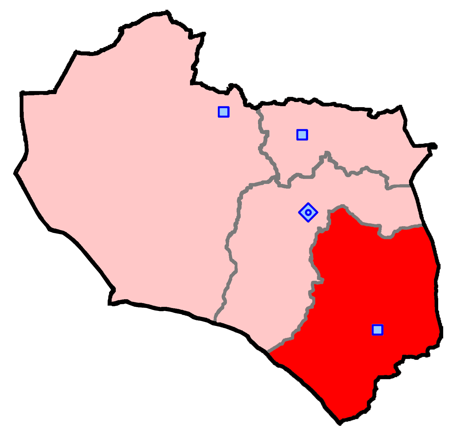 حوزهٔ انتخاباتی نهبندان و سربیشه برای انتخابات مجلس شورای اسلامی